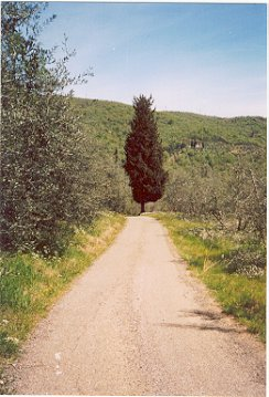 Immagine dei monti del Chianti - Convertoie (da de.wiki) Beschreibung: Auf dem Weg von Greve in Chianti nach Convertoie Quelle: (selbst fotographiert) 2003 Fotografiert im April 2003 Fotograf oder Zeichner: Andreas Petzinna (:de:User:Pz) Copyright Status: GNU Freie Dokumentationslizenz